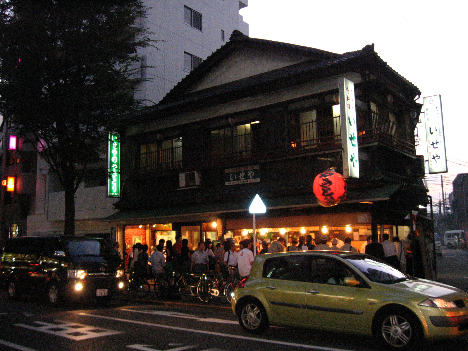 吉祥寺にある老舗焼き鳥店、いせや総本店。写真は旧店舗（改築のため2006年9月で閉店。2008年5月に新店舗ビルが完成、営業開始） なお、撮影当時は交通渋滞のため店の前に自動車が多く店のみの撮影ができず、車が横切る画になった。